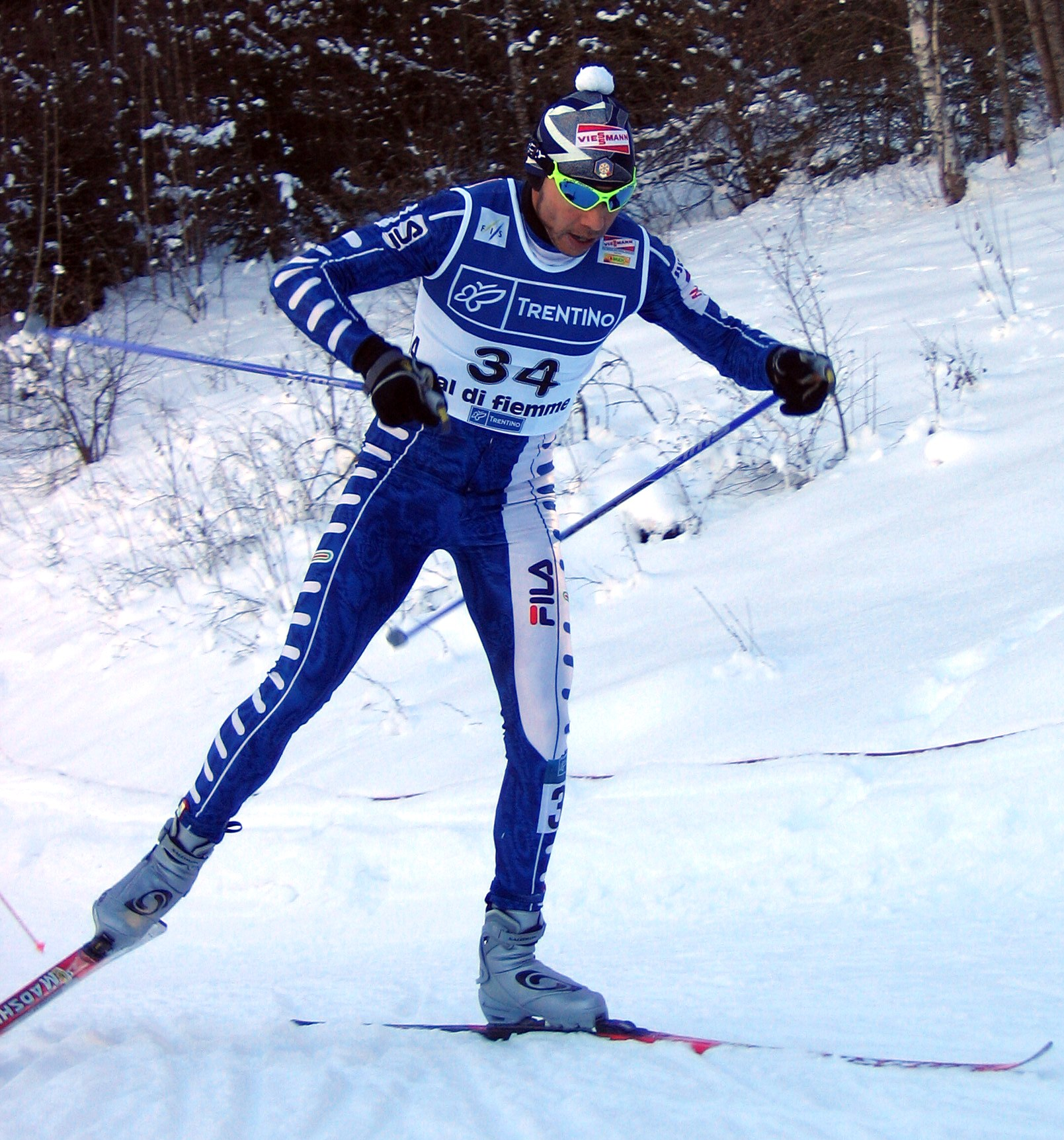 Italian skier Cristian Zorzi.